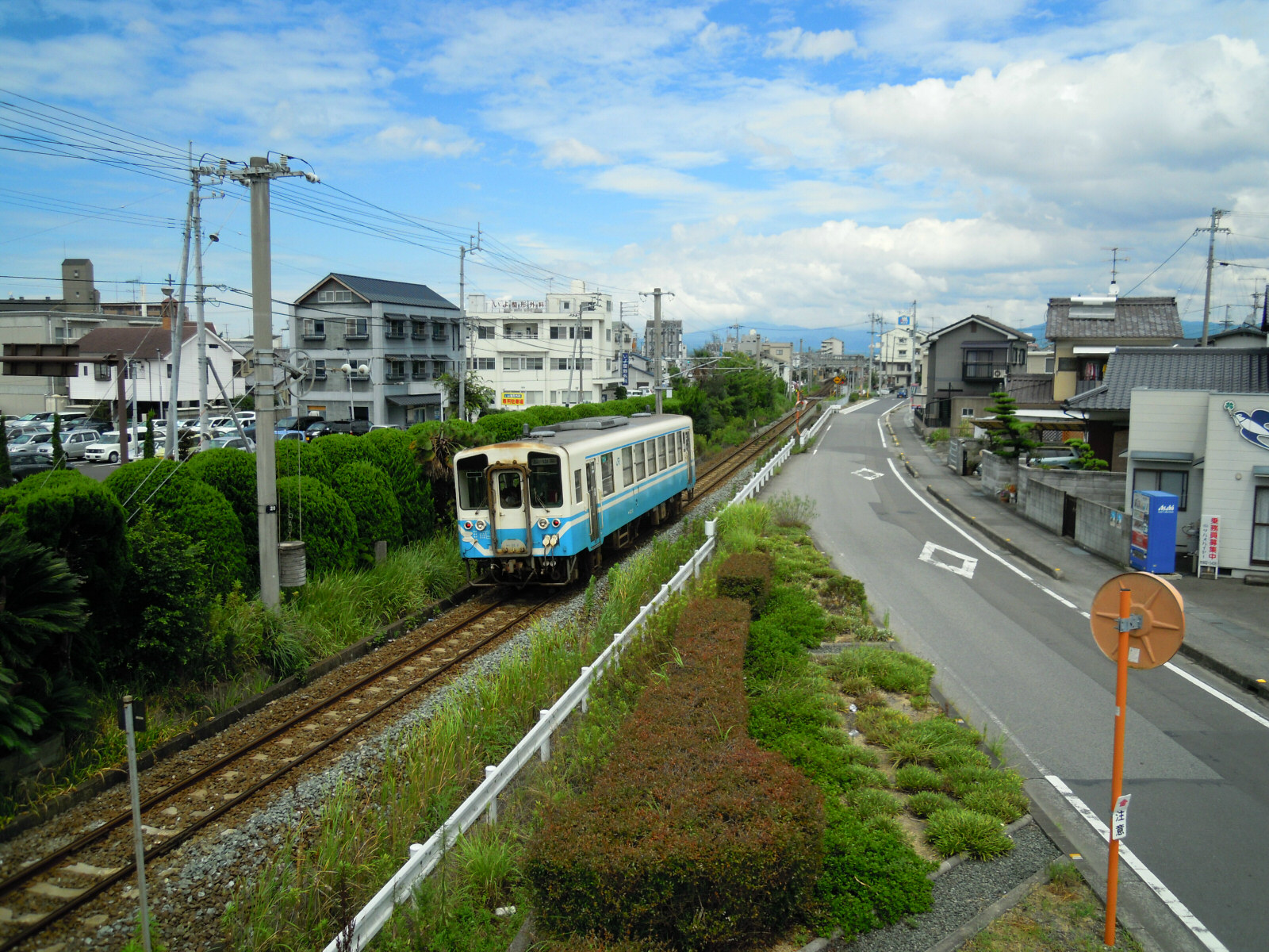 Kominato